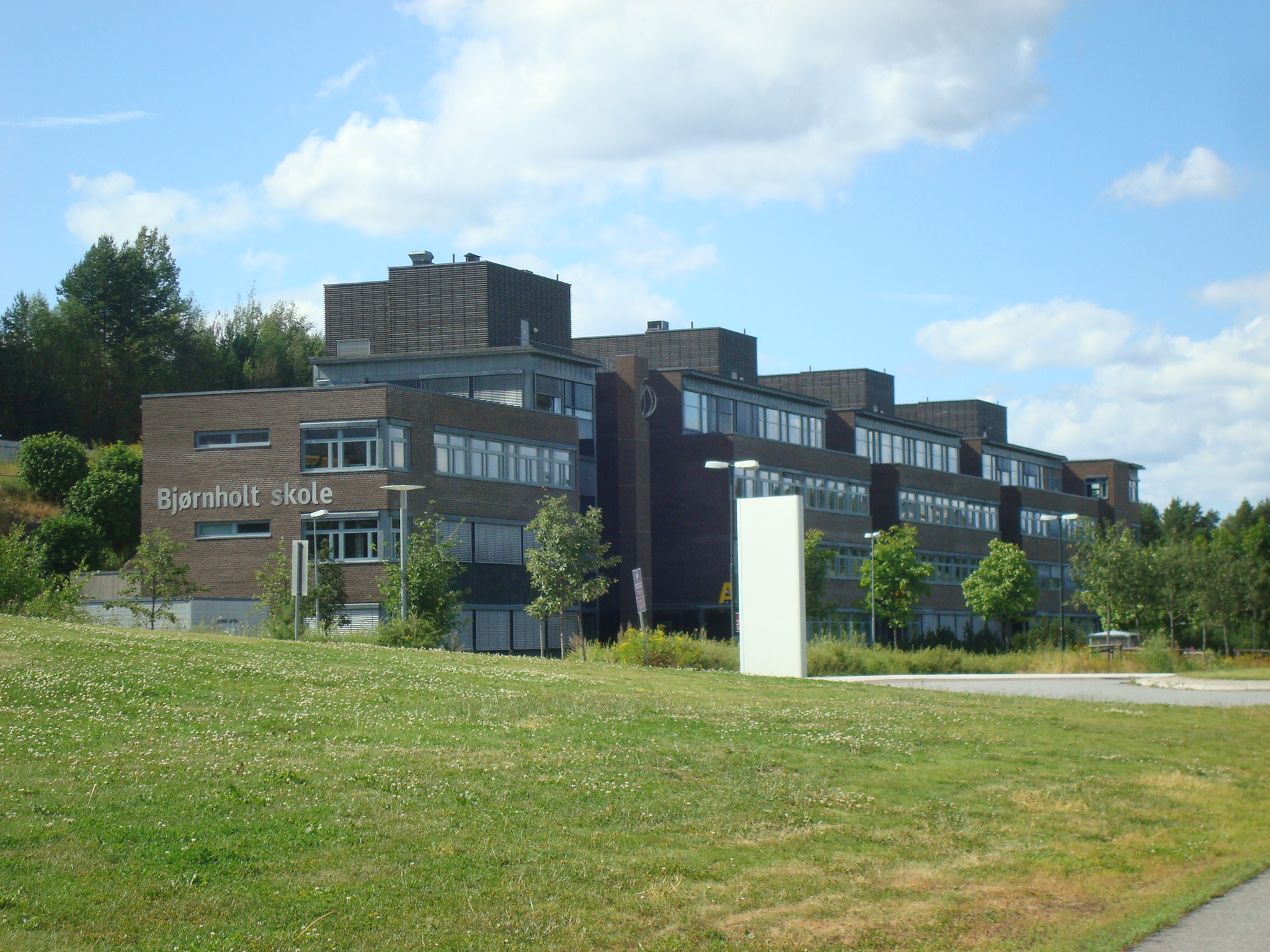 Bjørnholt skole i Oslo.